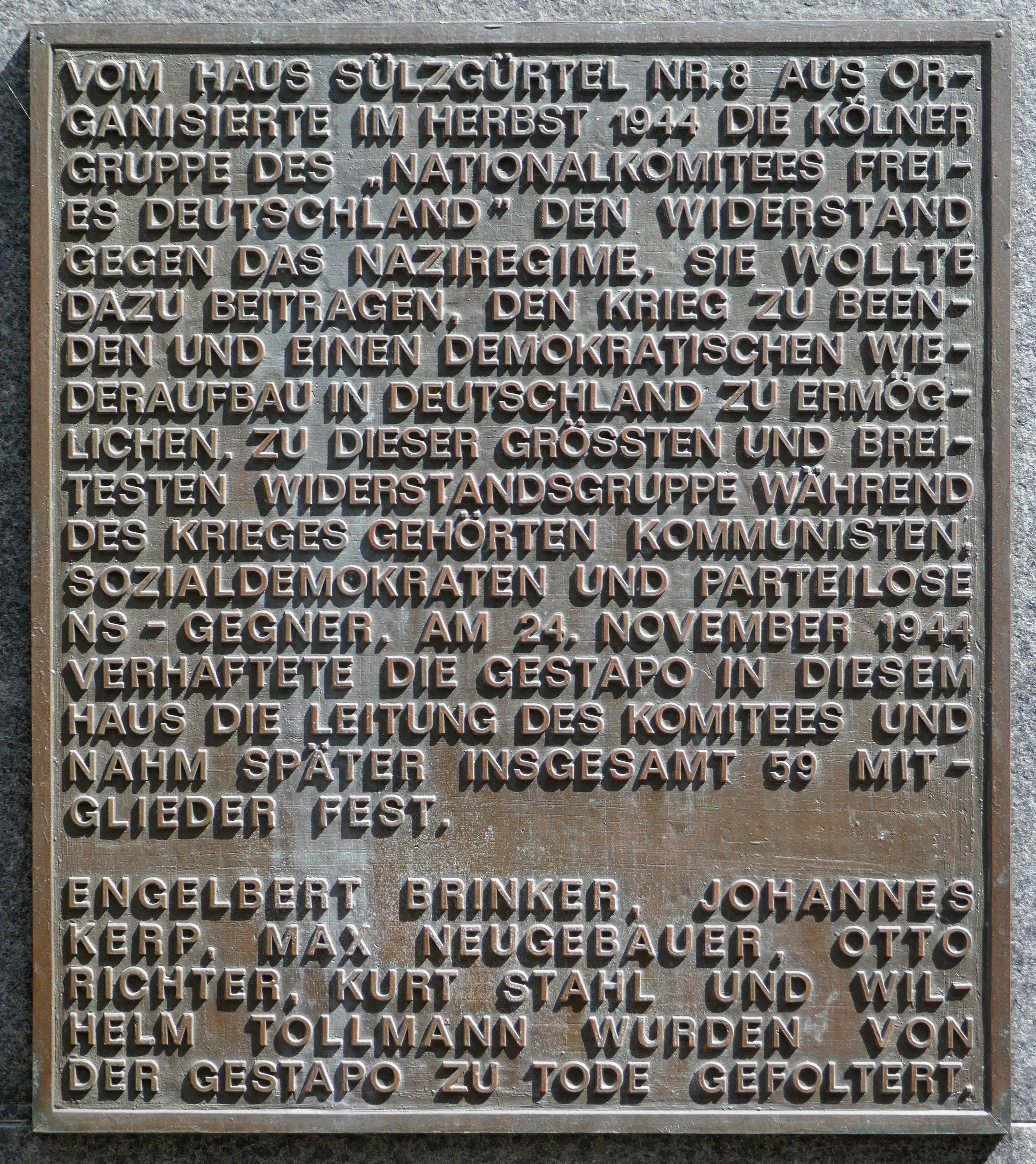 Gedenktafel für Engelbert Brinker, Johannes Kerp, Max Neugebauer, Otto Richter, Kurt Stahl und Wilhelm Tollmann (Nationalkomitee Freies Deutschland) - Sülzgürtel 8, Köln.